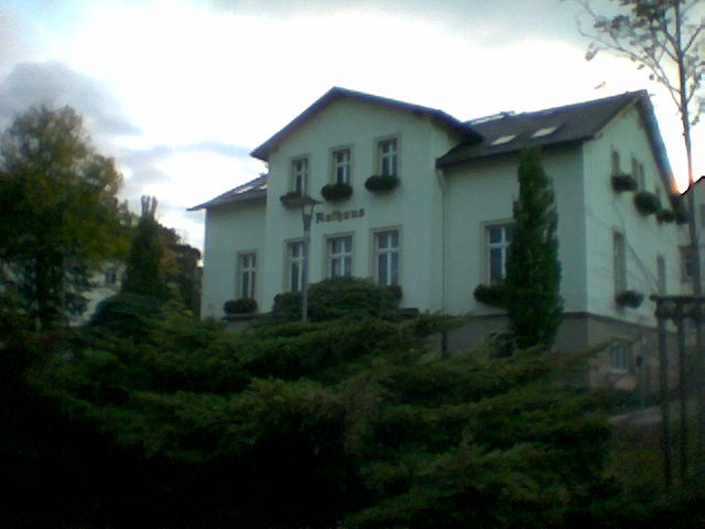 Rathaus von Niederwiesa